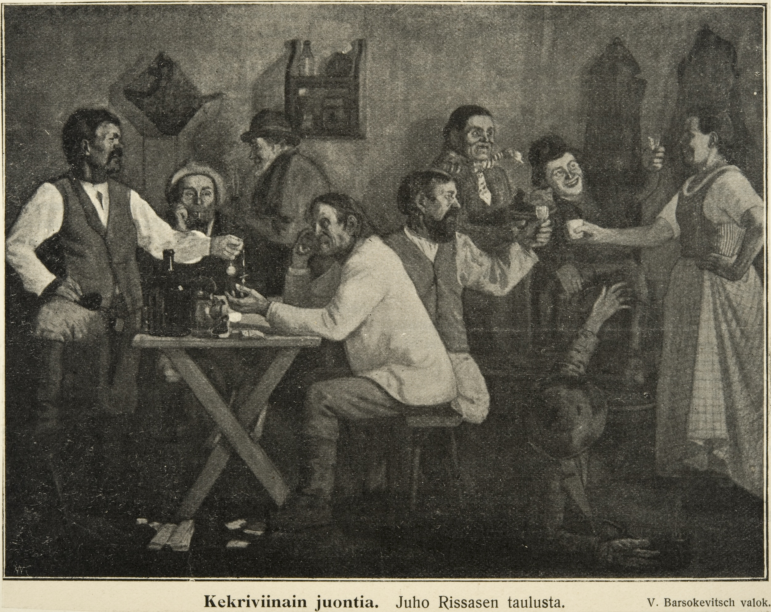 Toisinto Juho Rissasen taulusta kekriviinain juontia 1903